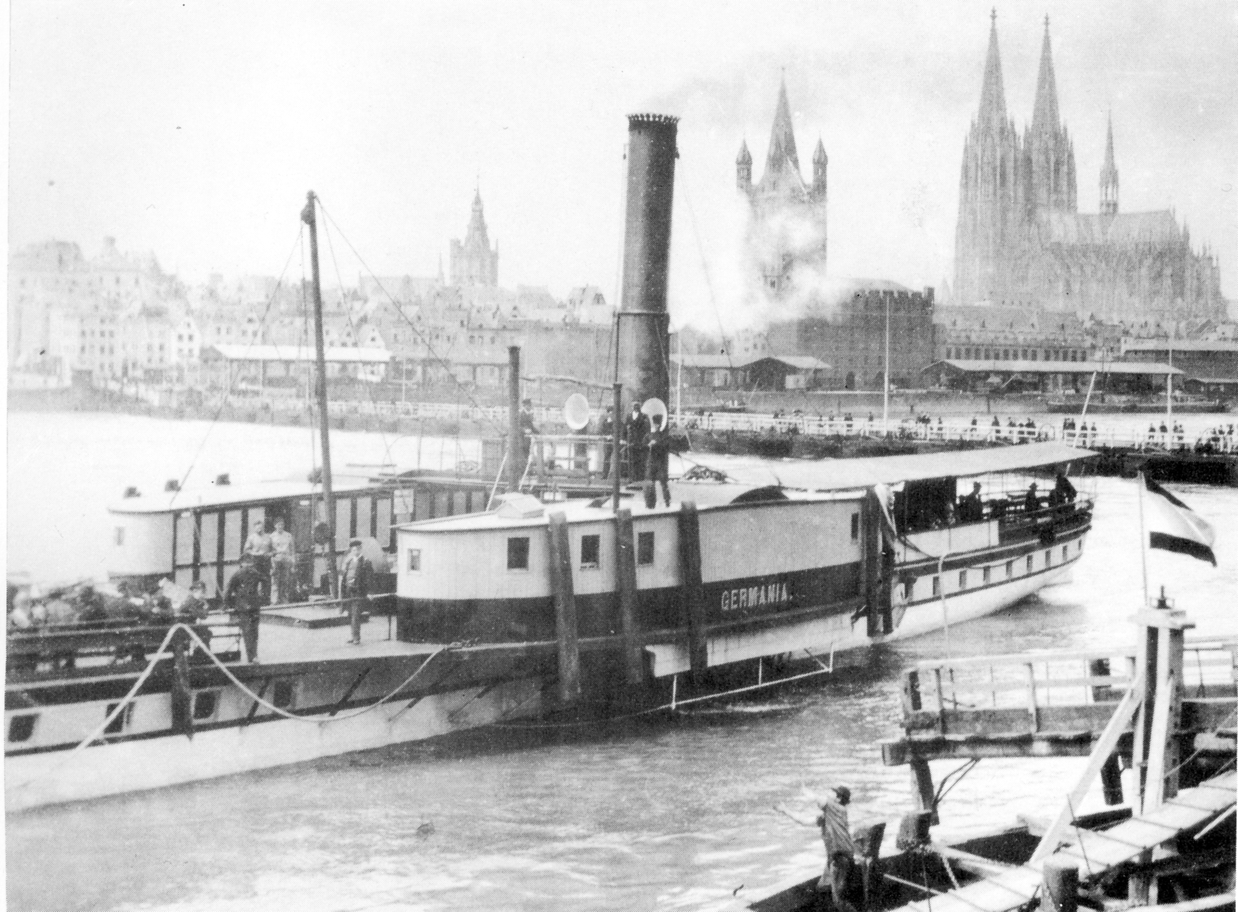 Raddampfer Germania 1842